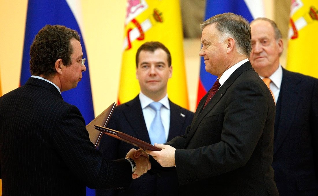 Глава РЖД Владимир Якунин и исполнительный директор «Патентес Тальго СЛ» (исп. PATENTES TALGO S.L.) Хосе Мария Ориоль Фабра (исп. José María de Oriol Fabra) (слева) в присутствии Дмитрия Медведева и Короля Испании Хуана Карлоса I подписали соглашение о взаимном сотрудничестве